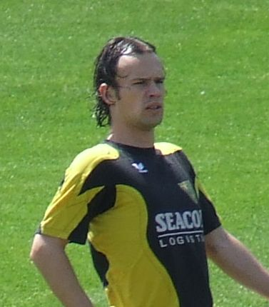 Niels Fleuren, VVV Venlo